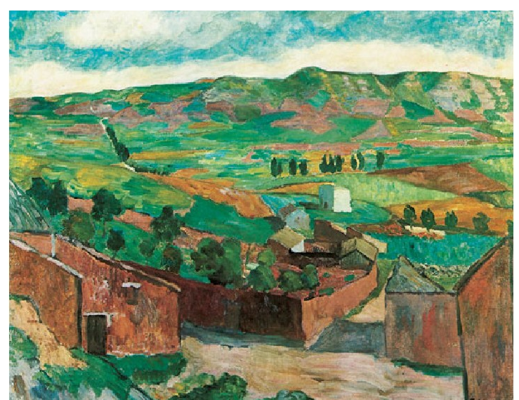 “Paisaje de Pampliega”, Juan Etxebarria